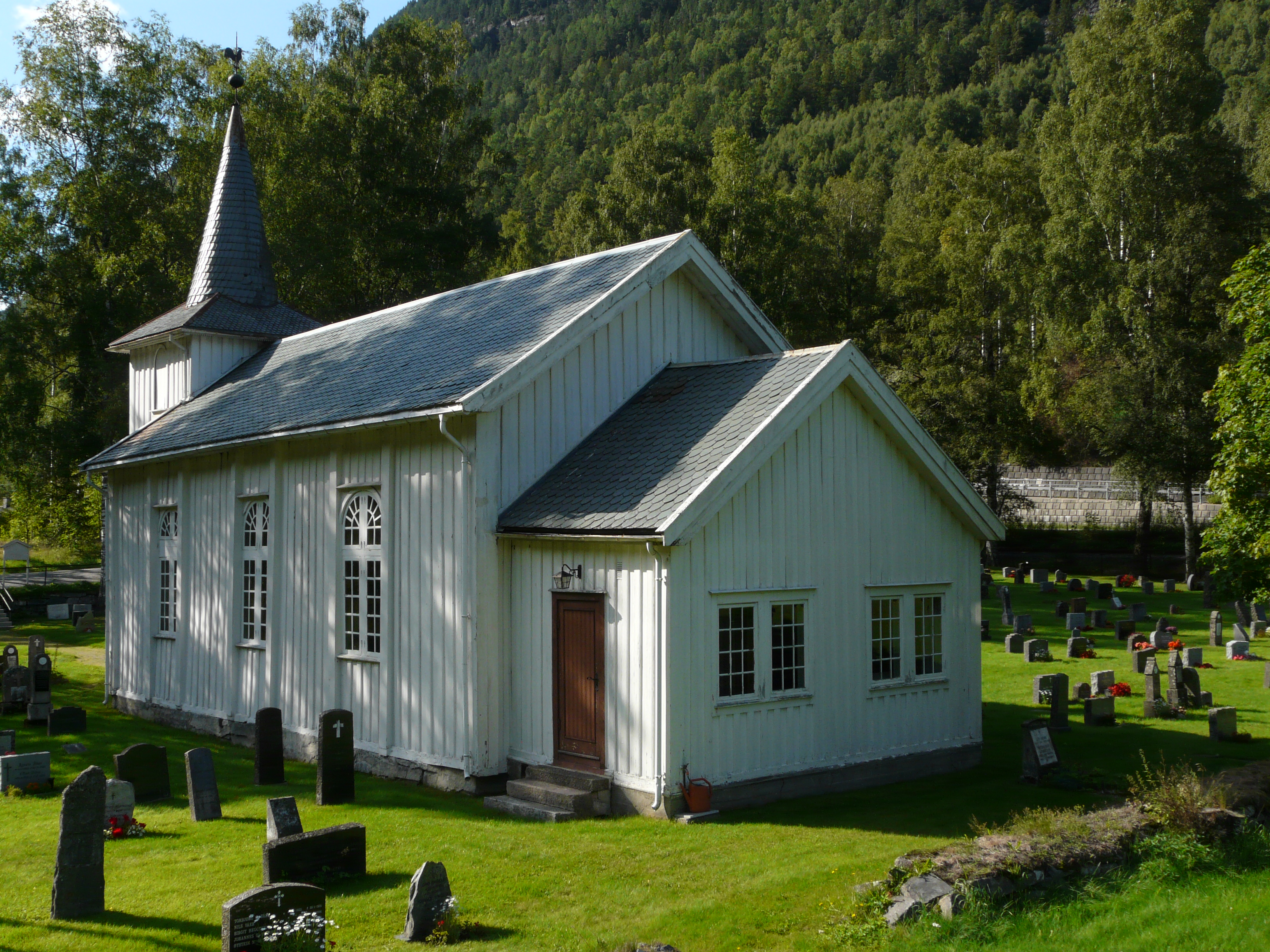 Dal kirke fra 1775 i Tinn kommune, Telemark fylke.